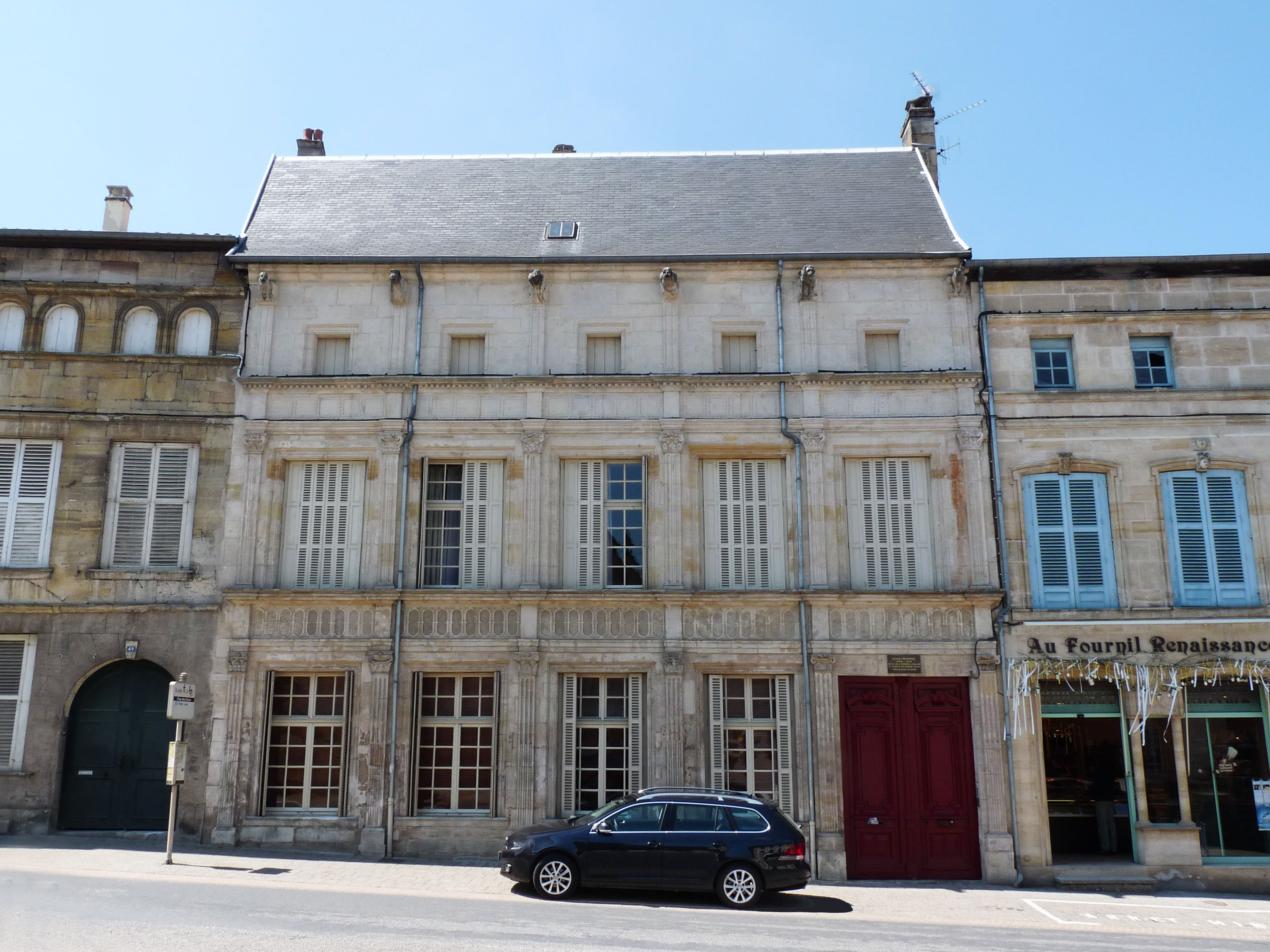 Hôtel de la Bessière : immeuble au 47 de la rue des Ducs-de-Bar à Bar-le-Duc (Meuse), où Georges Bernanos résida de 1924 à 1926 et écrivit son premier roman, Sous le soleil de Satan